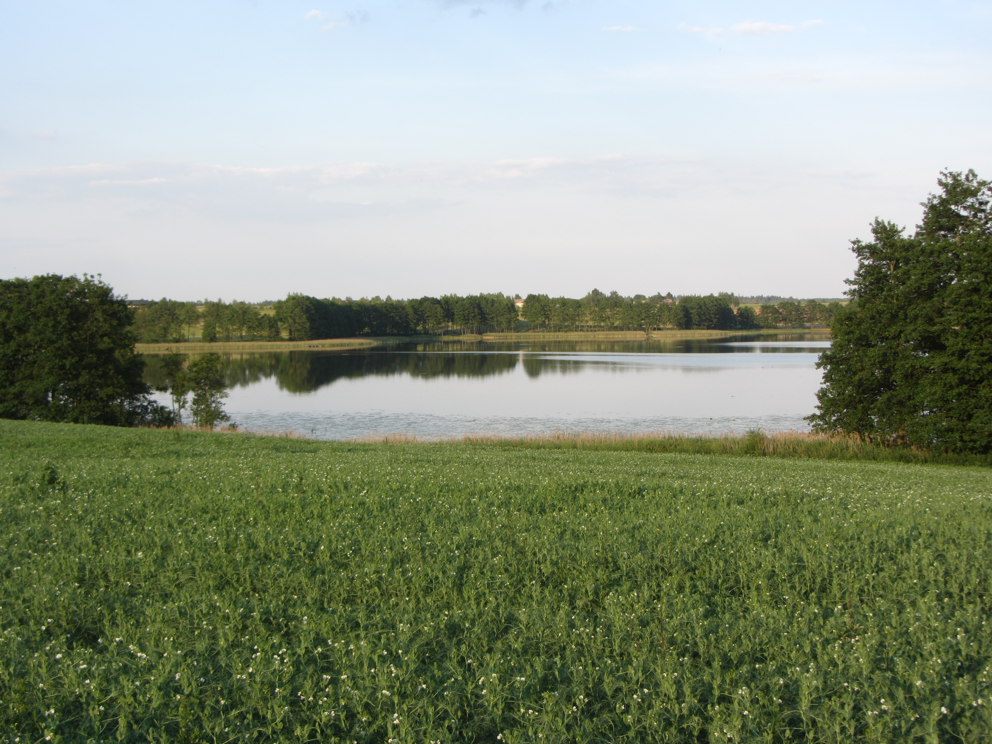 Alovė, Lithuania